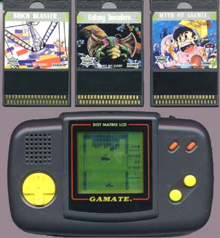 Consola Gamate con tres juegos